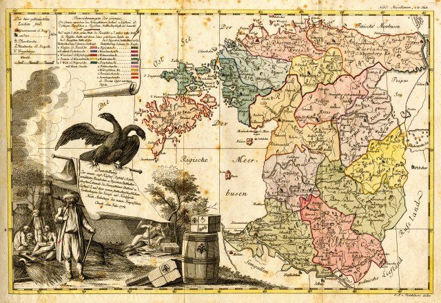 Scan from Johann Christoph Brotze's book Sammlung verschiedner Liefländischer Monumente. Darstellung der neuen- auf Kaiser. Befehl i. J. 1783 errichteten Revalschen u. Rigischen Statthalterschaften … [Liefland; die Karte].